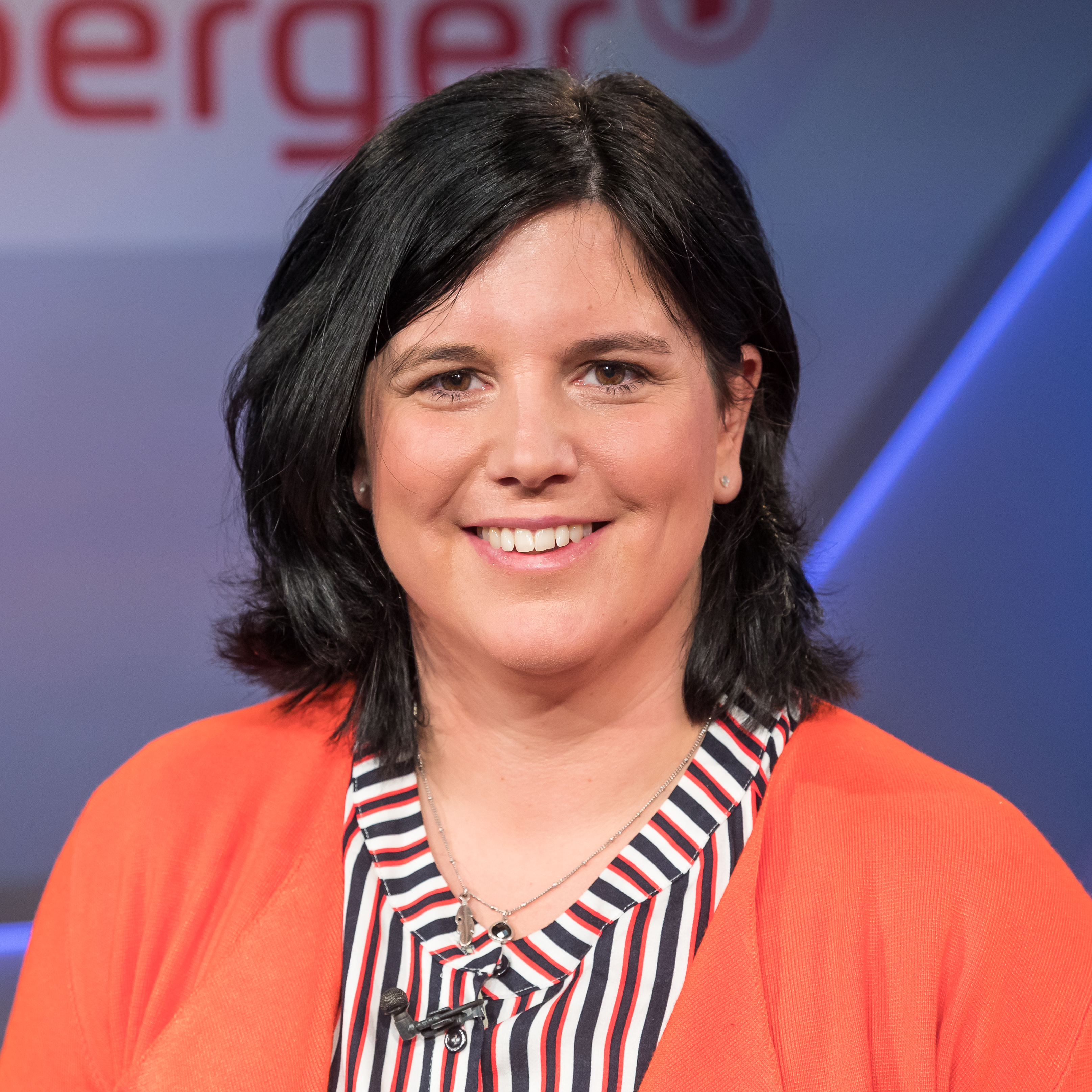 MAISCHBERGER am 27. Februar 2019 in Köln. Produziert vom WDR. Thema der Sendung: „Rettet die Biene, schützt den Wolf: Was ist uns der Naturschutz wert?“ Foto: Carina Konrad, FDP, Bundestagsabgeordnete und Landwirtin